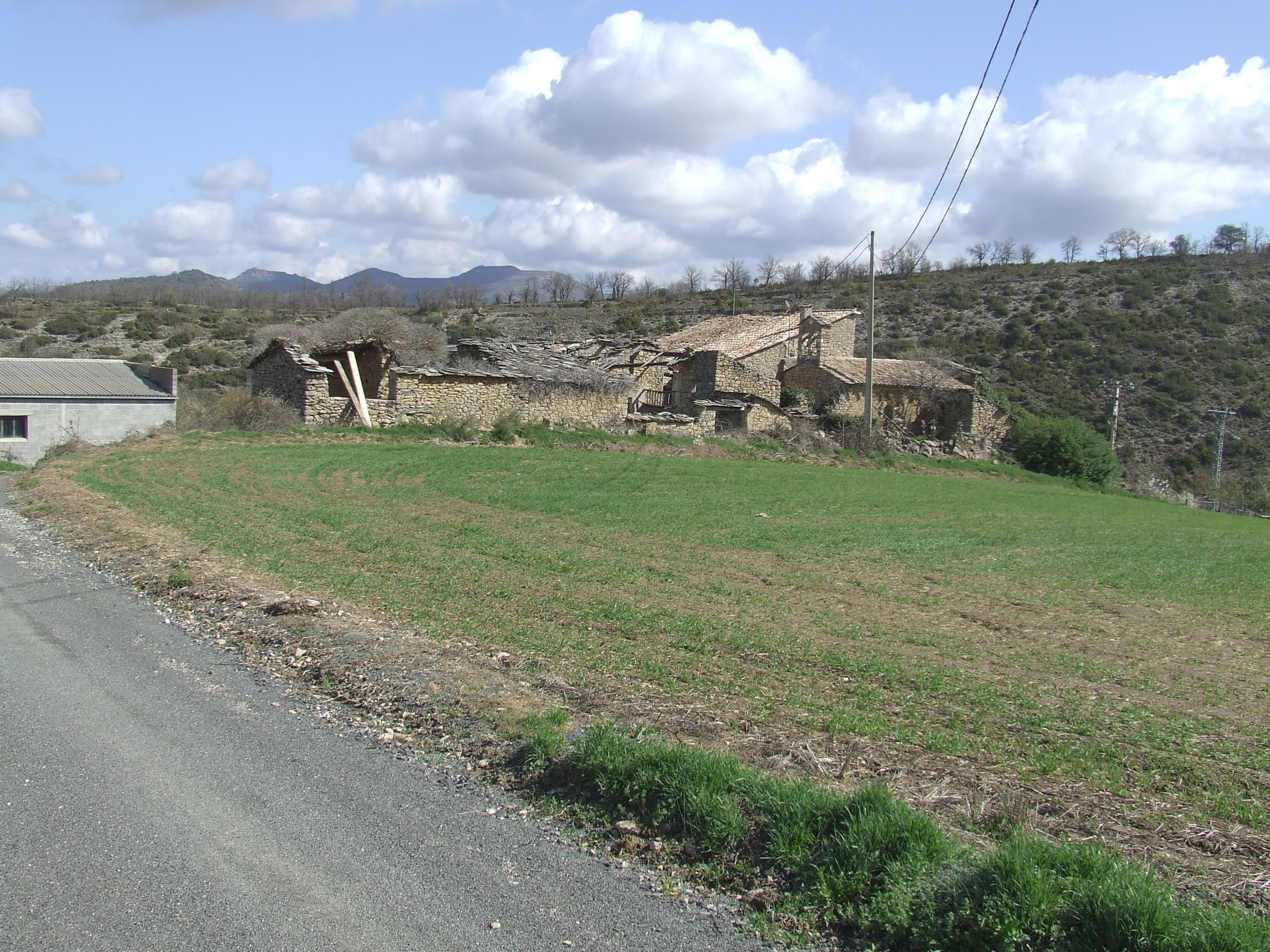 Nucliu principal de la Clua (Sant Esteve de la Sarga, Pallars Jussà)